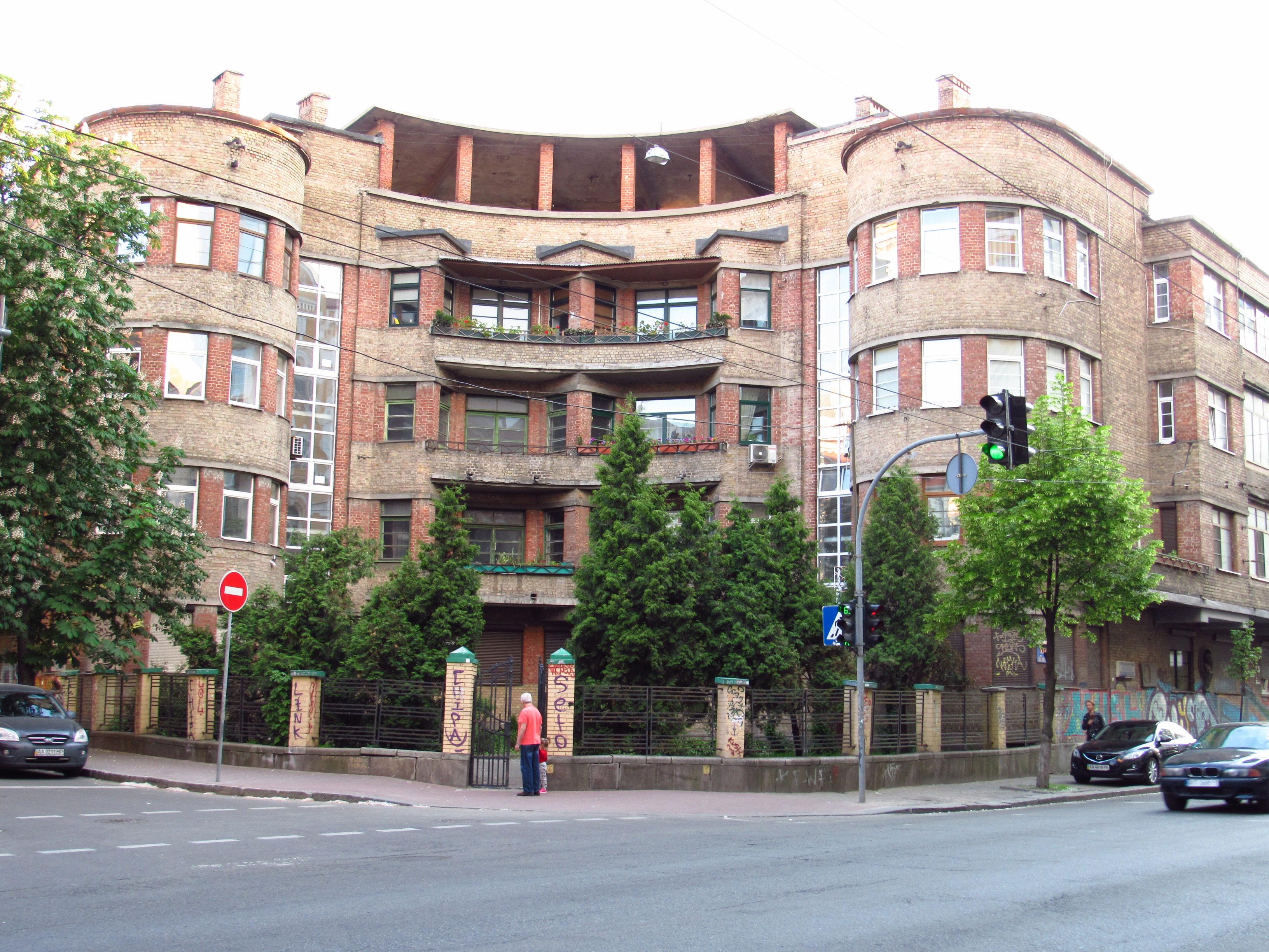 Будинок в якому мешкали у 1938–1947 рр. Л. М. Гаккебуш, народна артистка; у 1930–1961 рр. П. Ф. Альошин, Київ, Велика Житомирська вул., 17